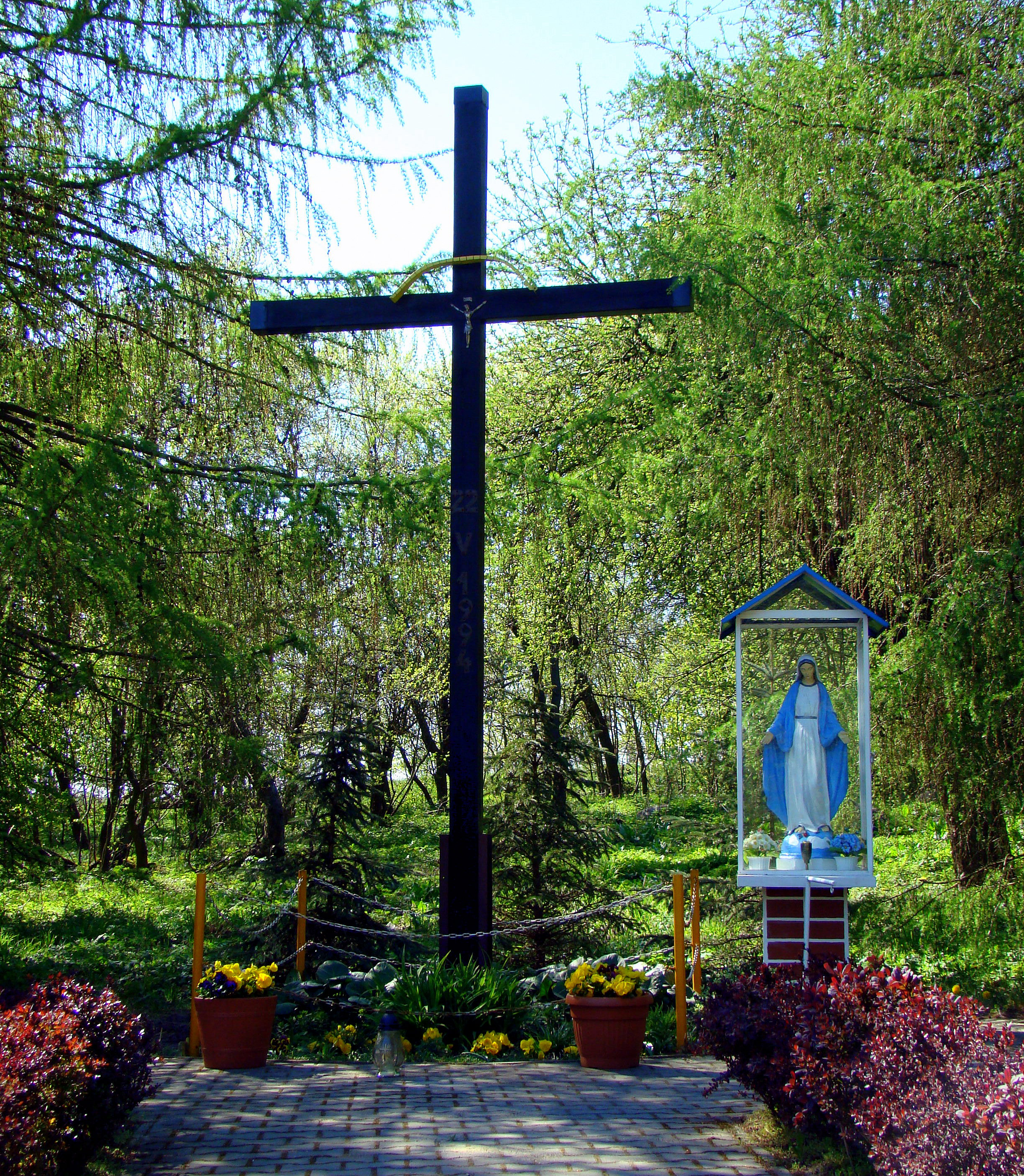 Leśno Górne, przydrożny krzyż we wsi, (Gmina Police, Powiat policki, Województwo zachodniopomorskie), Polska